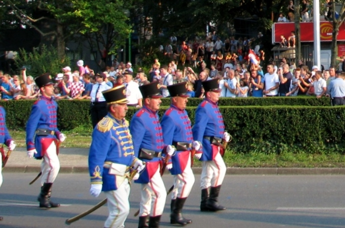 Karlovačka građanska garda na svečanom mimohodu u Zagrebu, 4. kolovoza 2015.